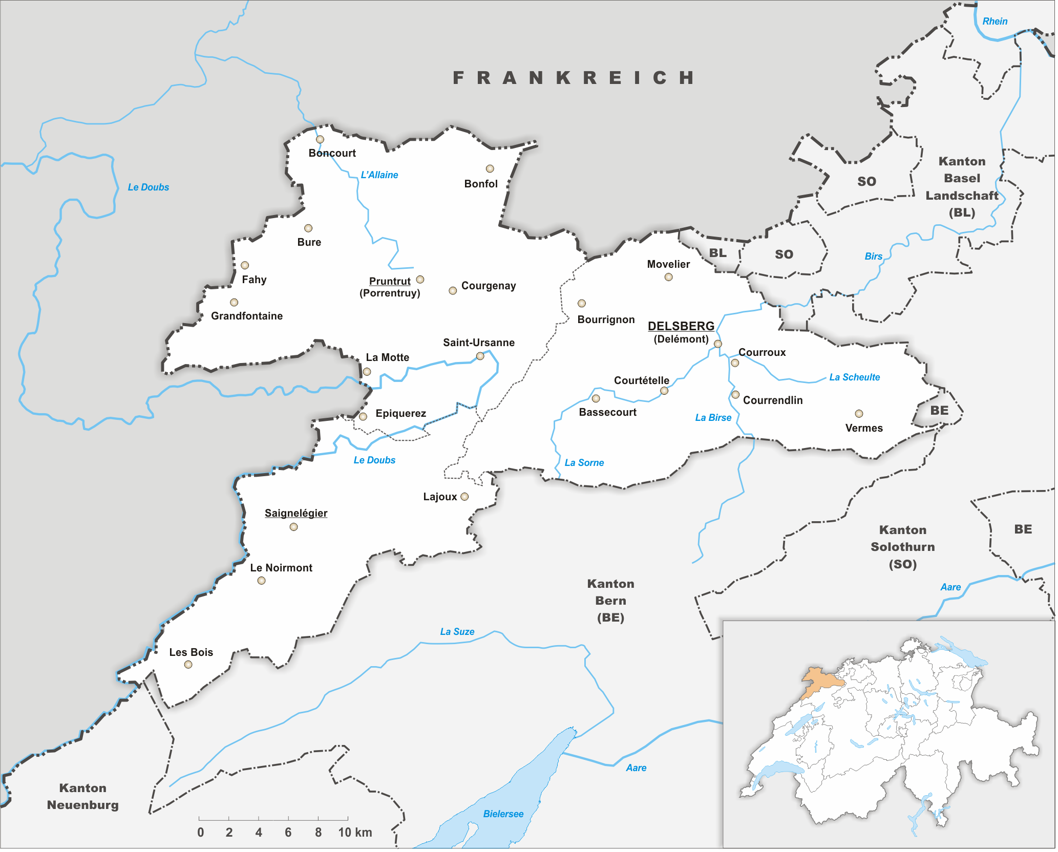 Karte des Kanton Jura.